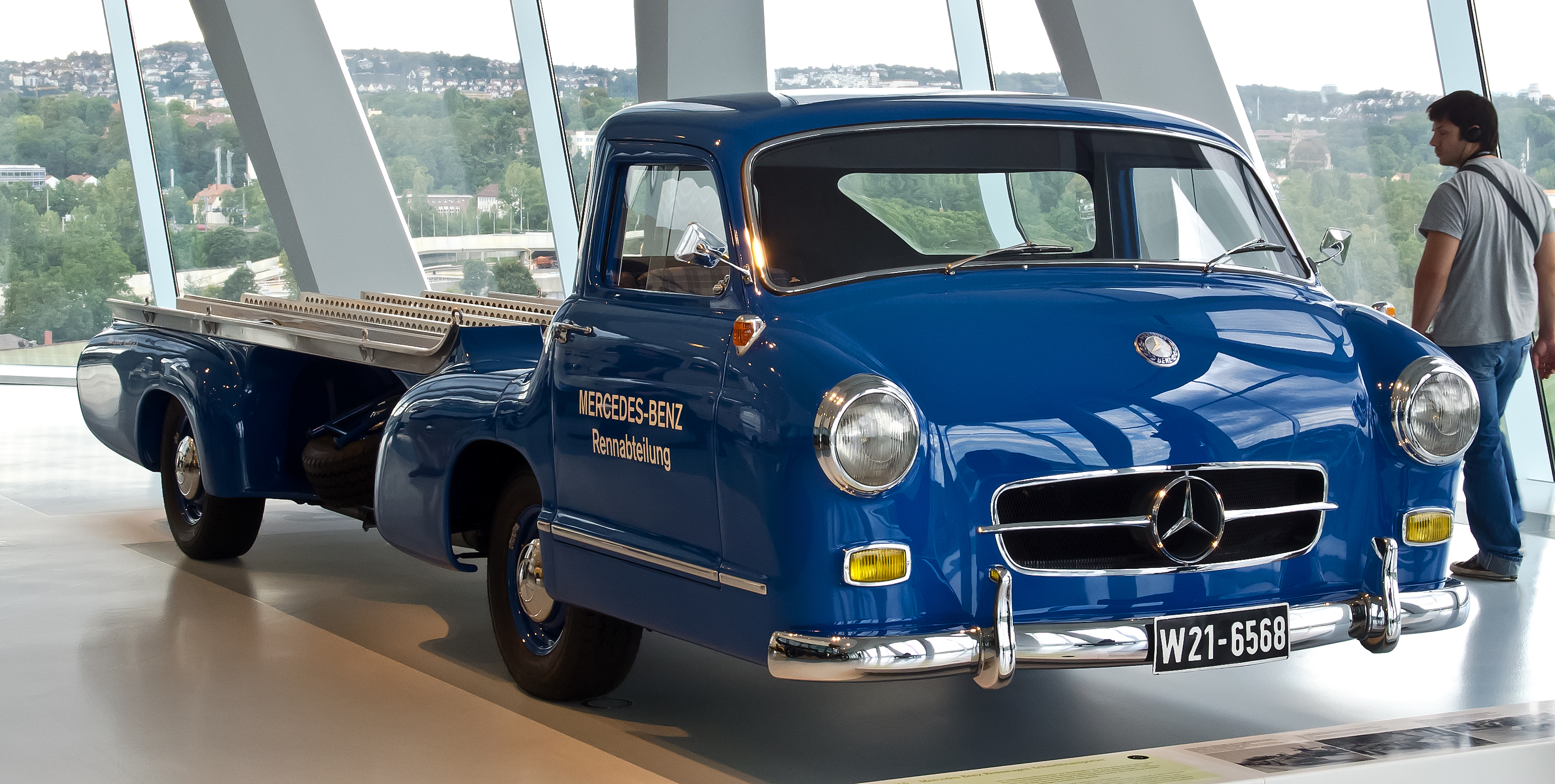 Mercedes-Benz Rennwagen-Spezialtransporter